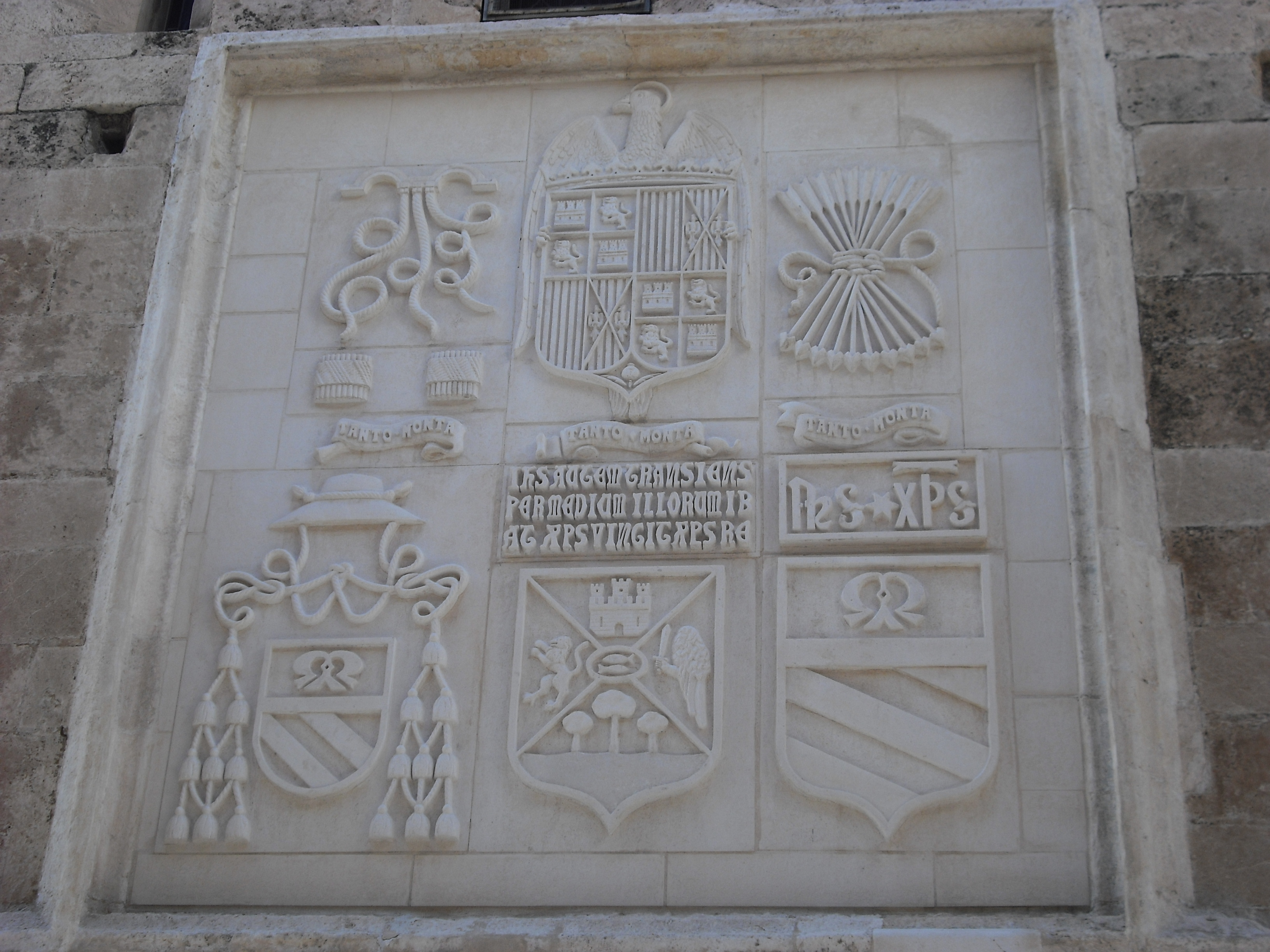 Escudos restaurados en el muro este de la Iglesia Arciprestal de Santiago de Villena. La explicación de las mismas es la siguiente, según la Relación de Villena de 1575: "Sancho Garçia de Medina [...], en la cabeça de dicha yglesia [de Santiago] puso las armas de vuesa magestad, e al pie e lados, las de esta çiudad declaradas en esta escritura, e mas baxas puso sus armas, que es un escudo, y de medio arriba una letra M, y de medio abajo, unas barras, y ençima del escudo, un sonbrero con borlas pendientes."